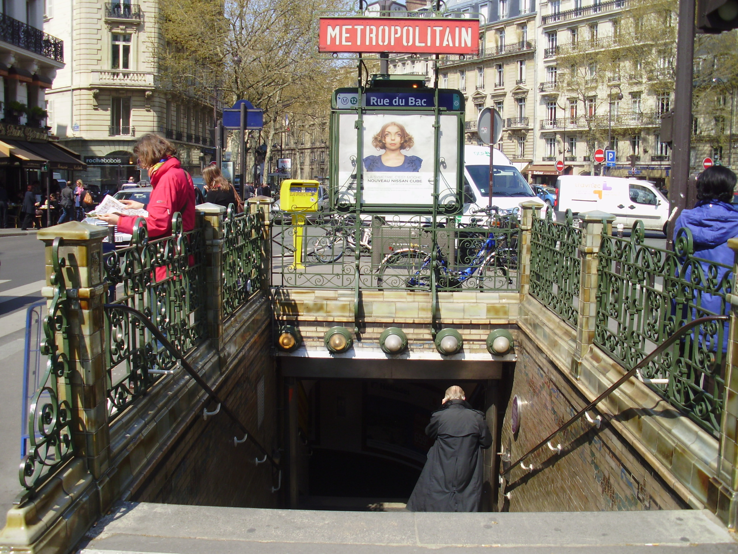 Entrée de la station Rue du Bac du métro de Paris.